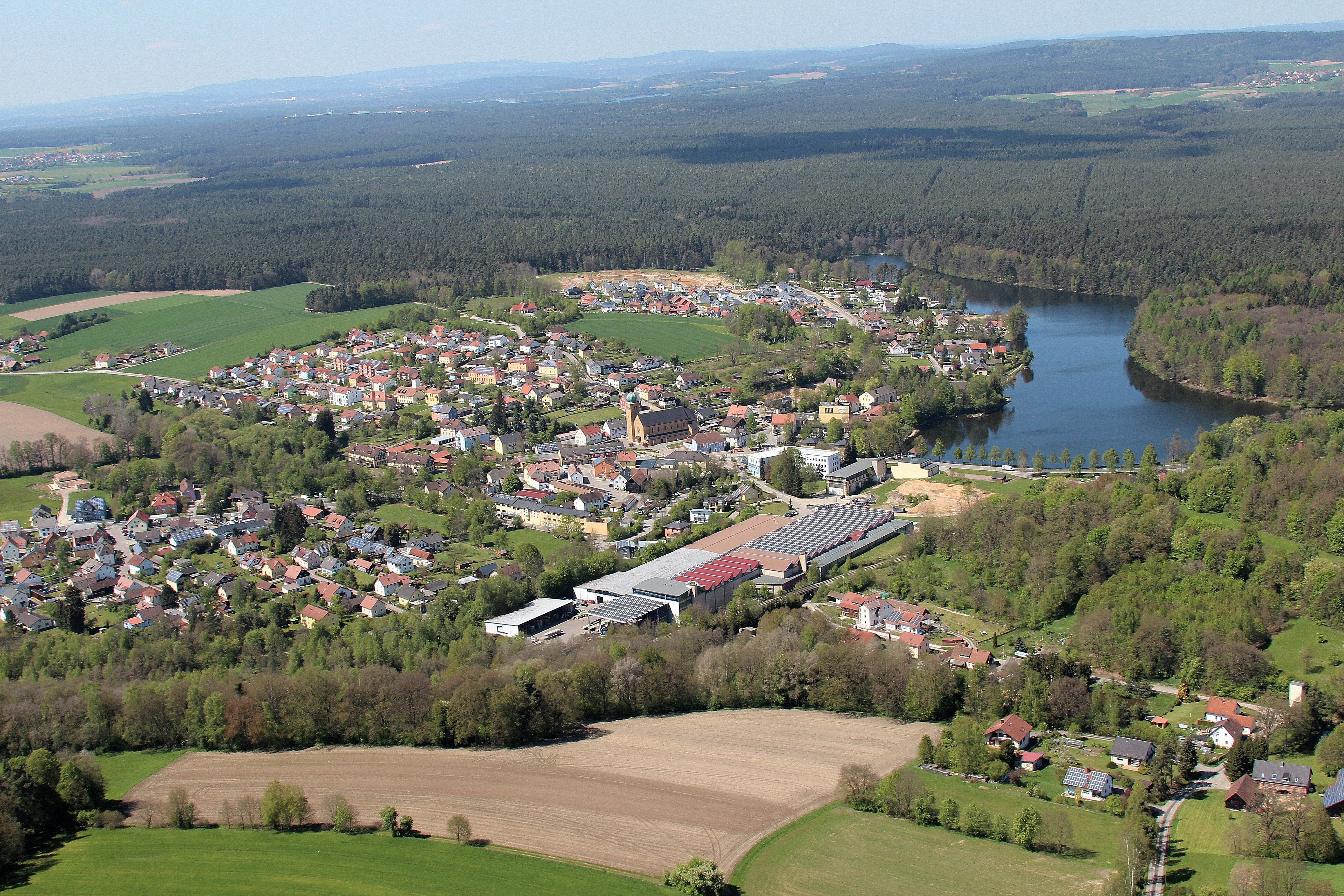 Bodenwöhr mit Hammersee; Gemeinde Bodenwöhr, Landkreis Schwandorf, Oberpfalz,Bayern